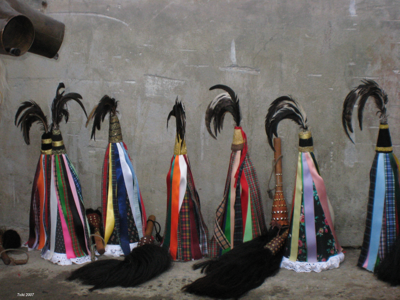 Un des éléments du costumes des ioaldunak (ceux qui portent les sonnailles) Pyrénées).